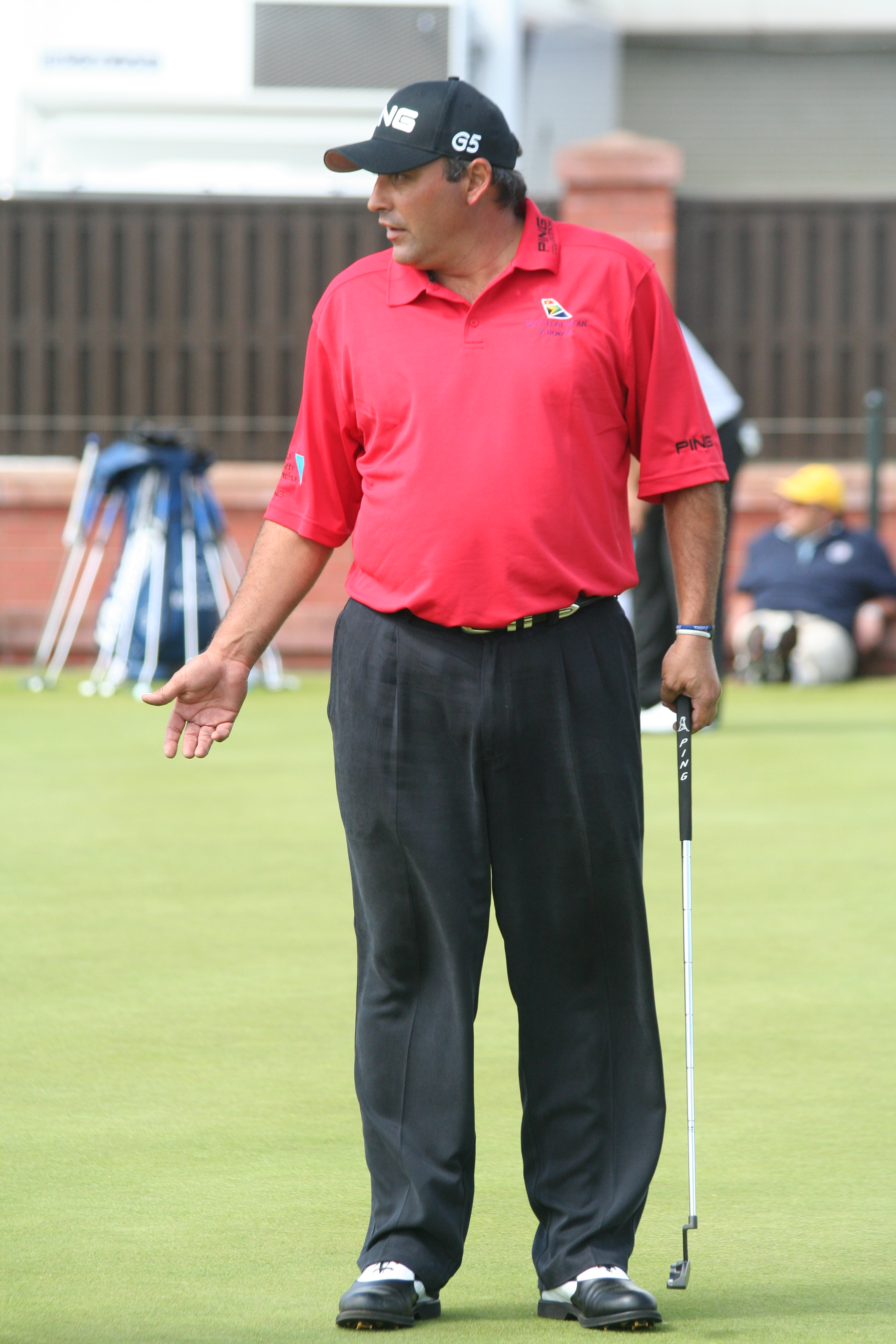 Angel Cabrera, July 2007